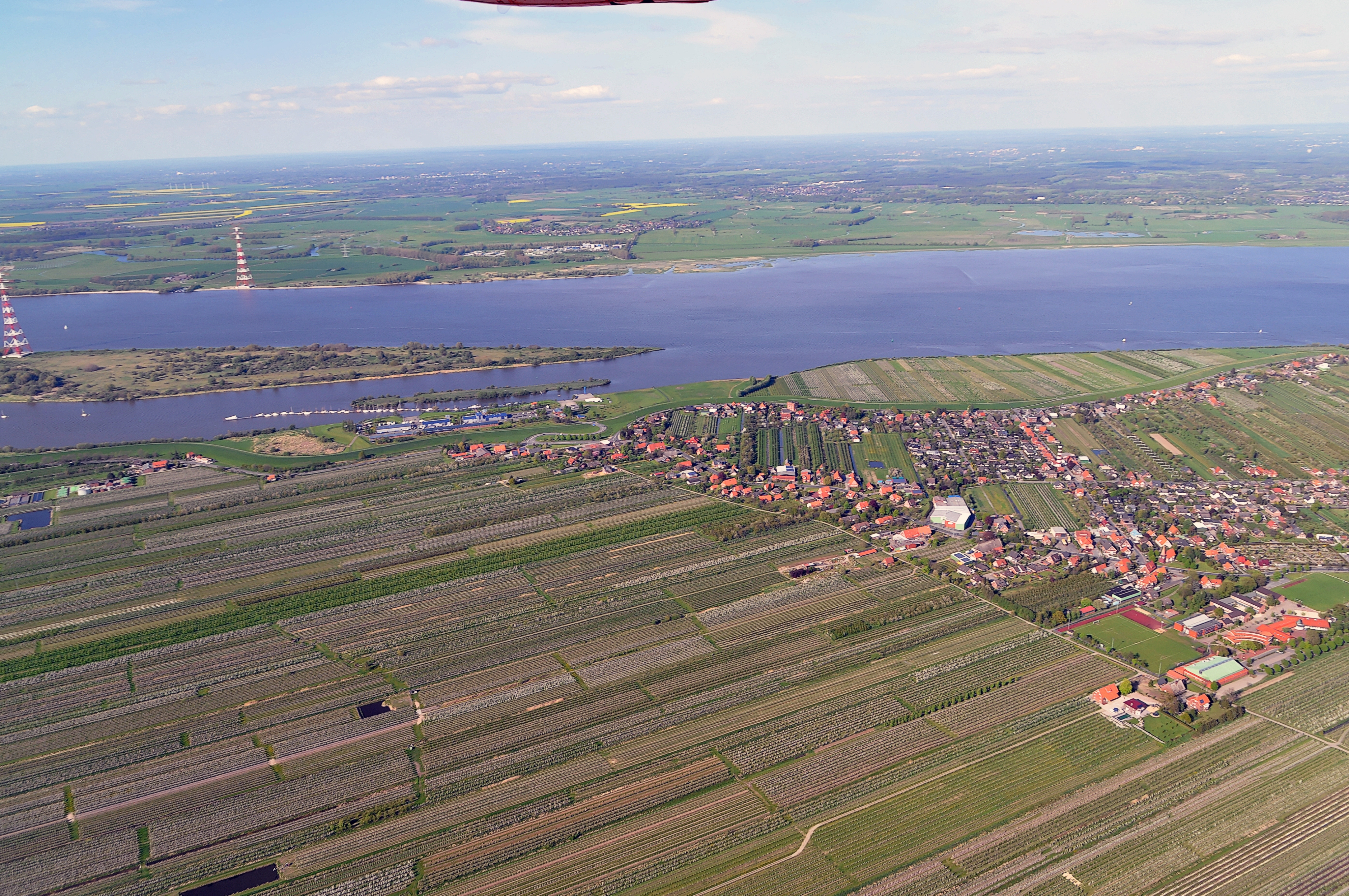 Luftbilder von der Nordseeküste 2012-05